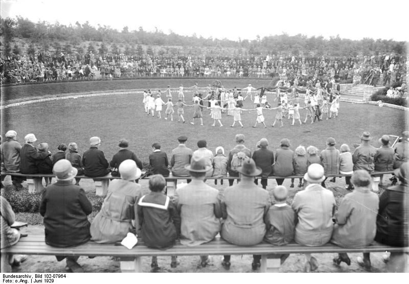 Die Eröffnung des grössten Volksparkes in Berlin! Der Goethe-Park, die ehenmaligen Rehberge in Berlin-Wedding, eine der schönsten und grössten Anlagen Berlins, wurde unter Anwesenheit von über 20000 Kindern und zehntausenden von Zuschauern feierlichst eröffnet. Blick in den Tanzring des neuen Volks-Parkes in Berlin, wo Kinder- und Märchenspiele vorgeführt werden